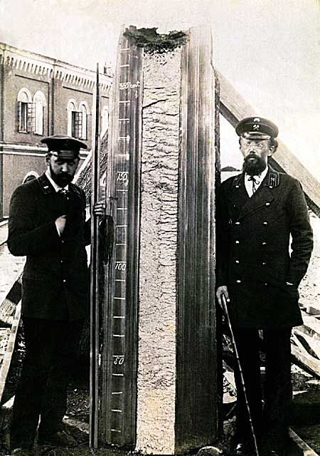 На фото: слева - инженер Туржанский, справа - Славянов